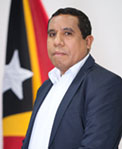 Francisco de Vasconcelos, Abgeordneter des Nationalparlaments Osttimors